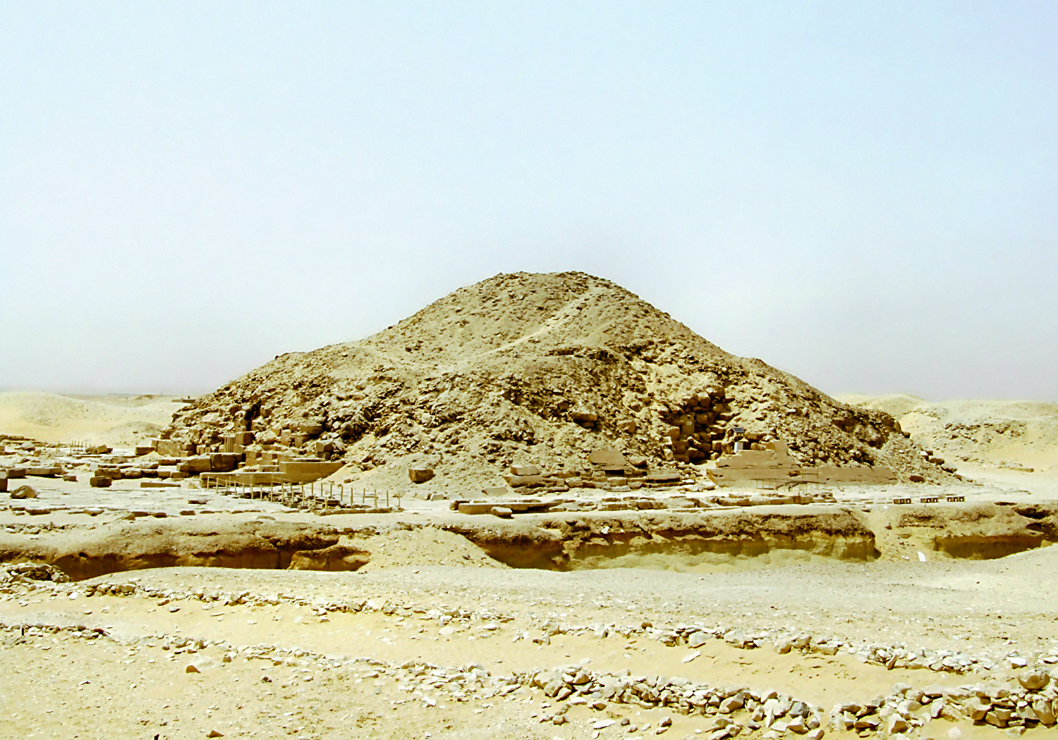 Nekropolia w Sakkarze (Memfis), piramida Unisa. (Memphis nekropolis, Pyramid of Unas)